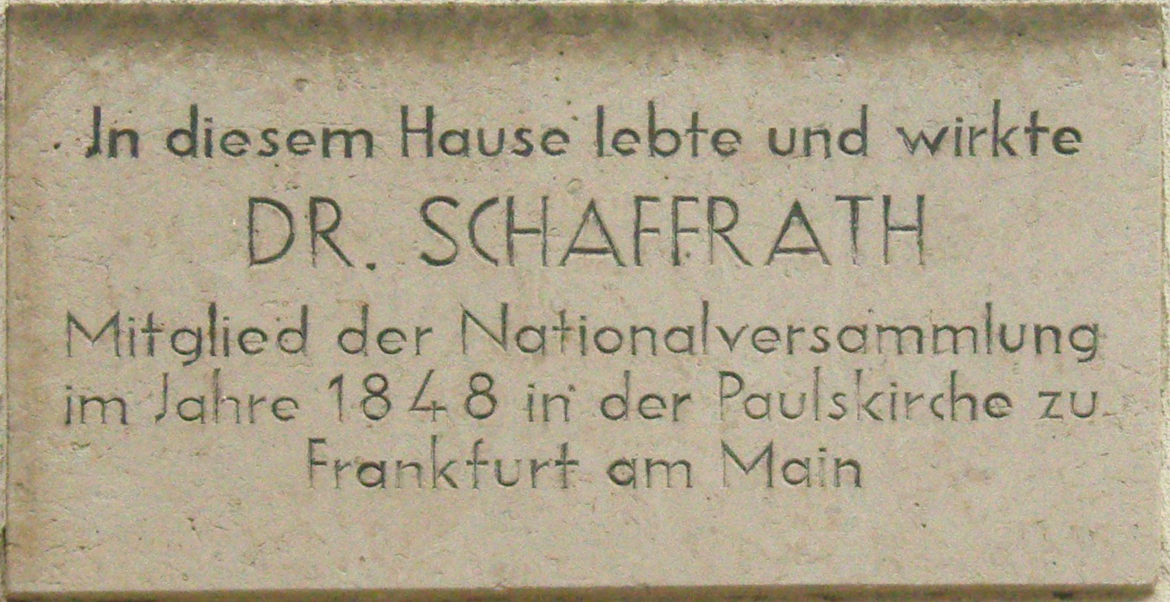 Gedenktafel am Wohnhaus von Wilhelm Schaffrath in Neustadt in Sachsen (Bahnhofstraße 29)